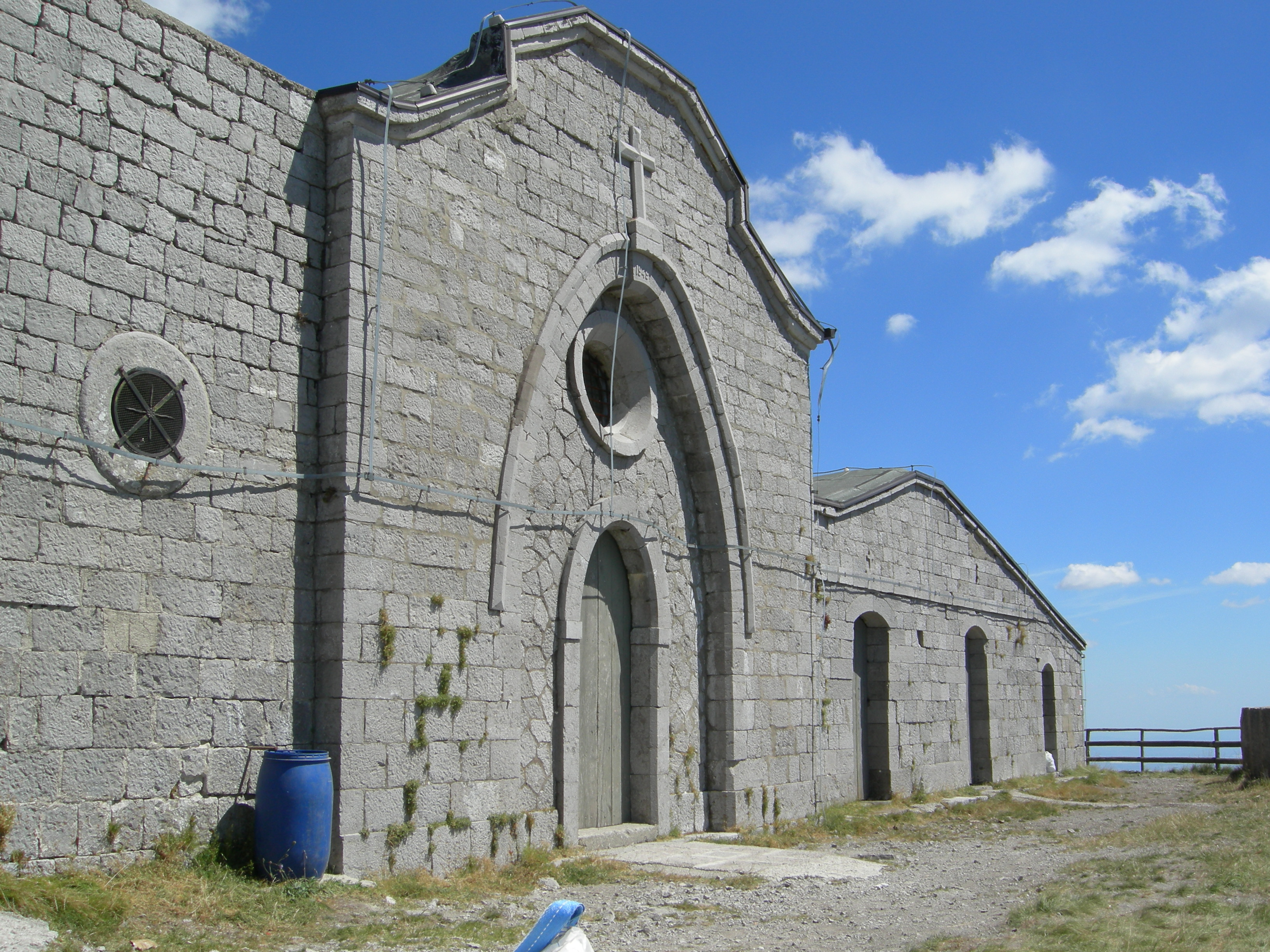 Chiesa di San Michele Arcangelo posta sulla sommità del Pizzo San Michele a 1567 m s.l.m.